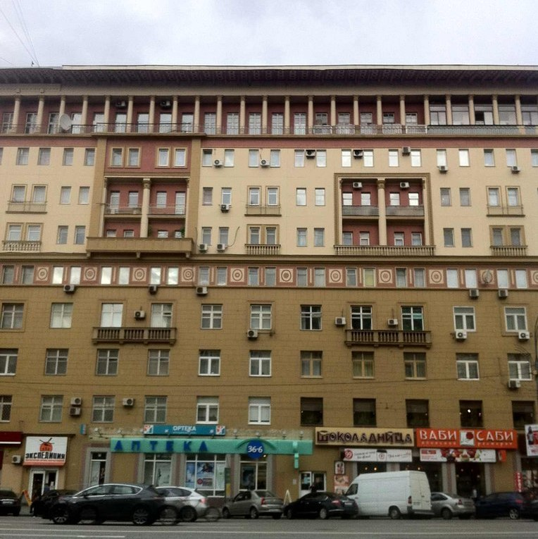 Москва, улица Земляной Вал, дом № 23С1 Жилой дом для ИТР Архитектор - И.З. Вайнштейн (1935)